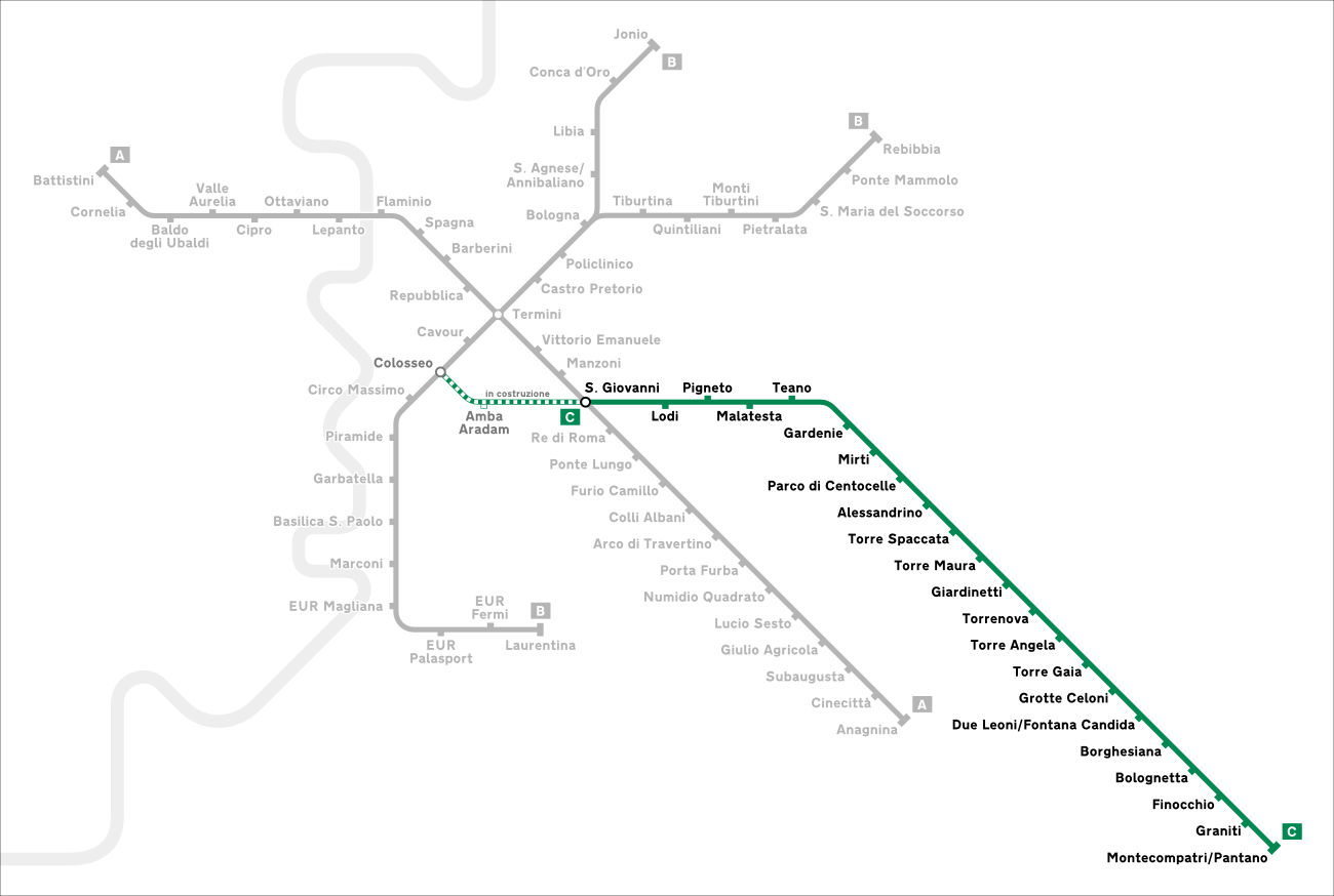 Mappa della linea C della metropolitana di Roma.